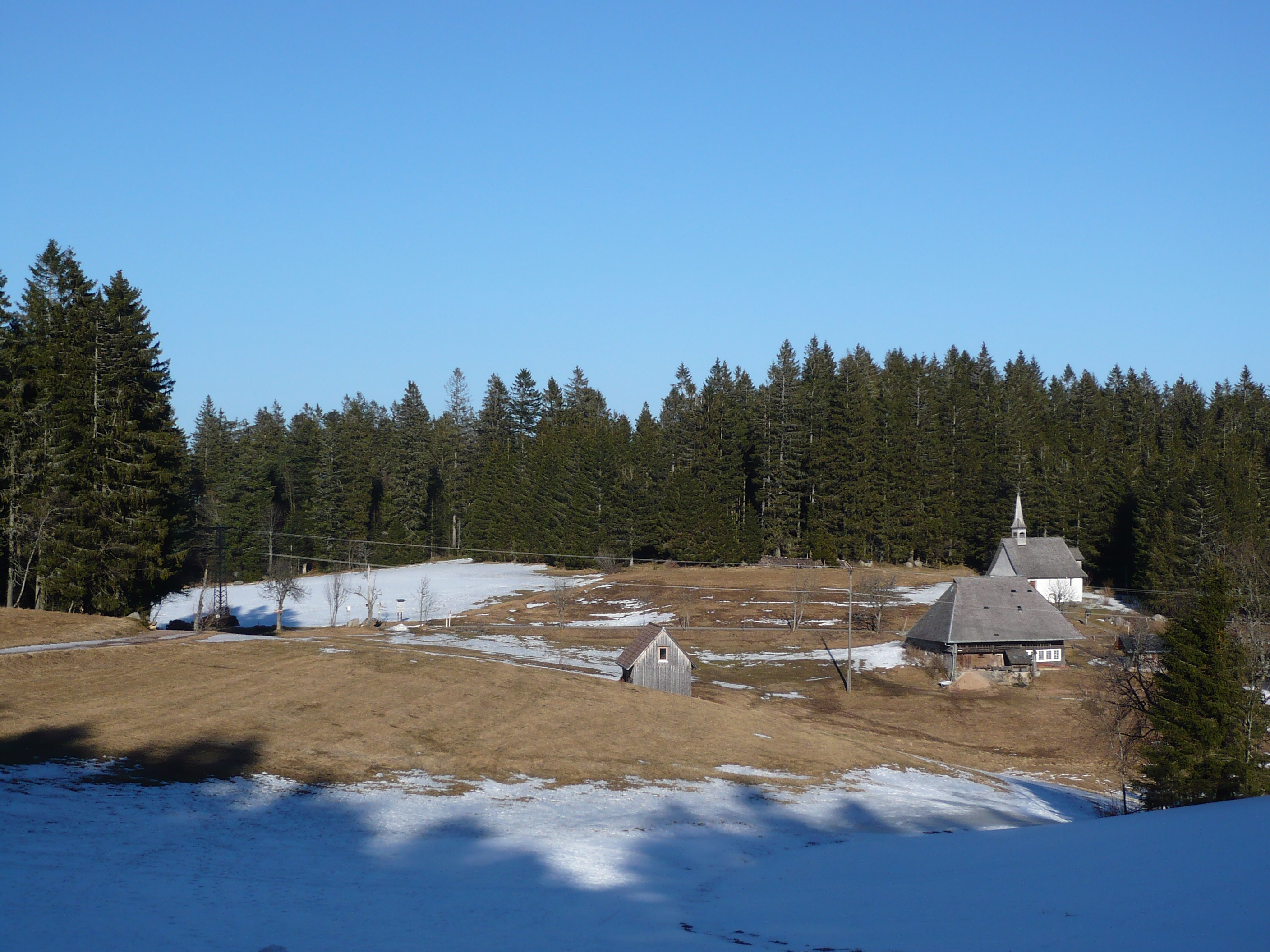 über der Martinskapelle